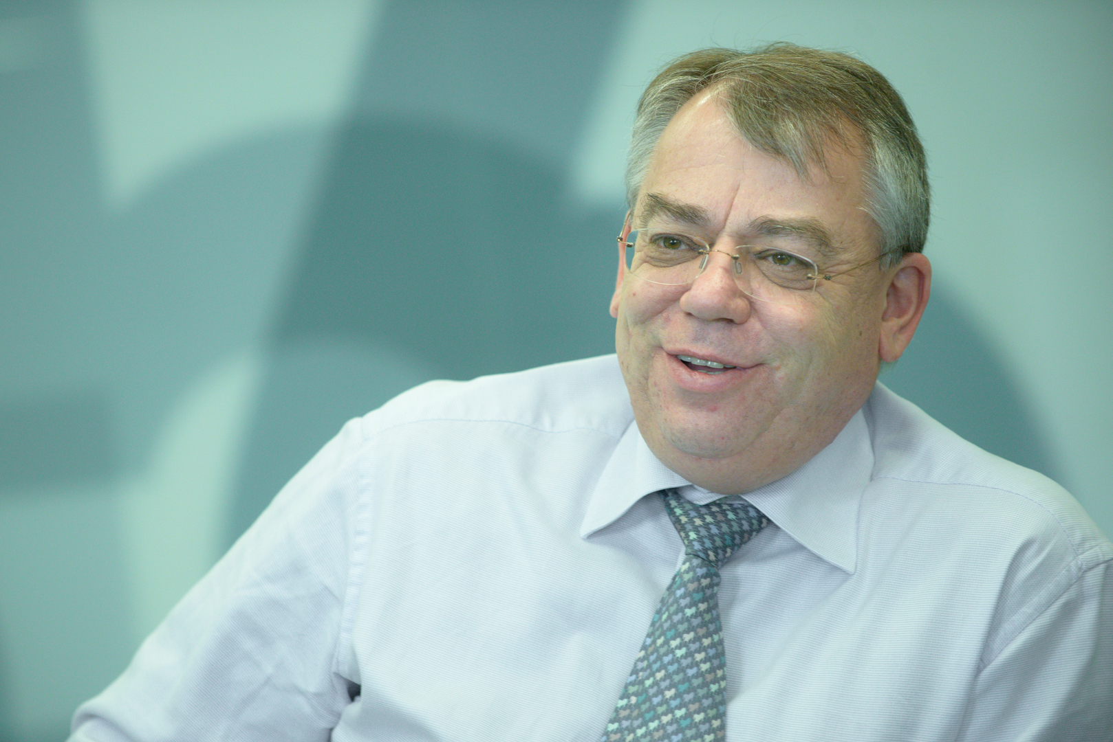 Klaus-Heiner Lehne, Mitglied des Europäischen Rechnungshofs, Luxemburg